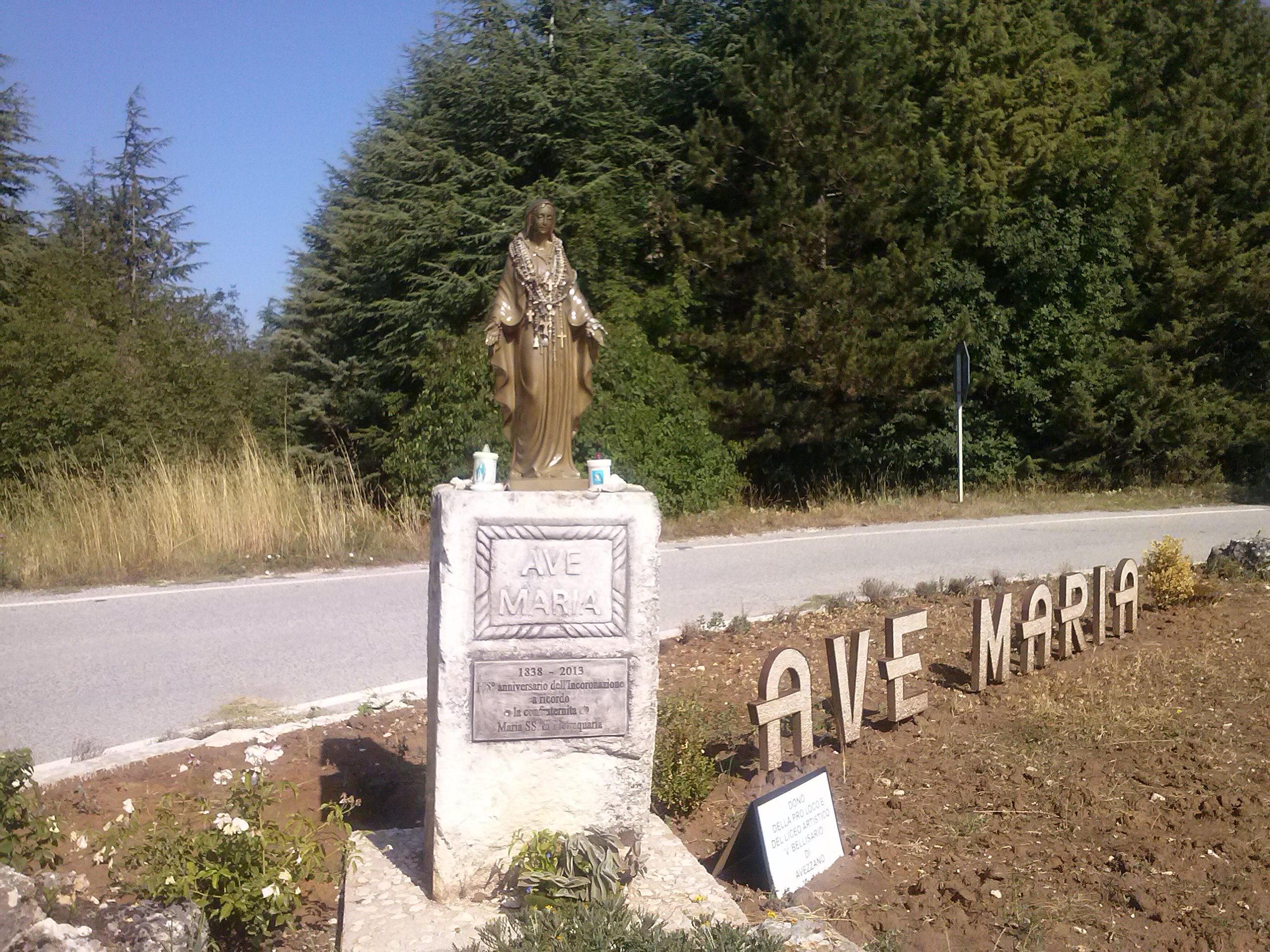 Madonnina sul valico del monte Salviano